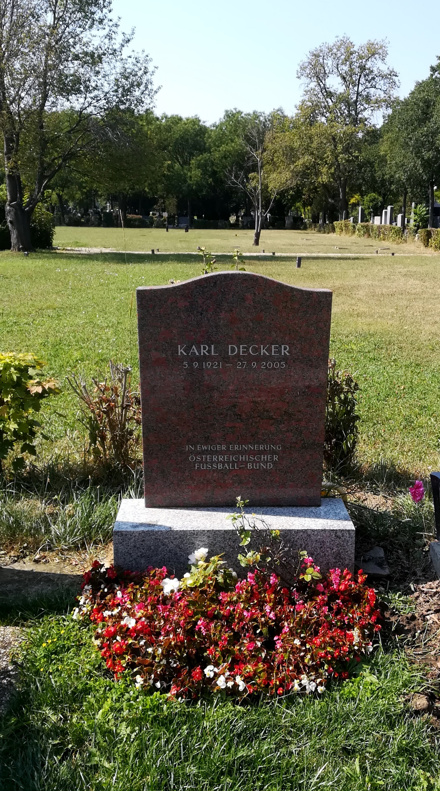 Vienna Zentralfriedhof la tomba del campione Karl Decker